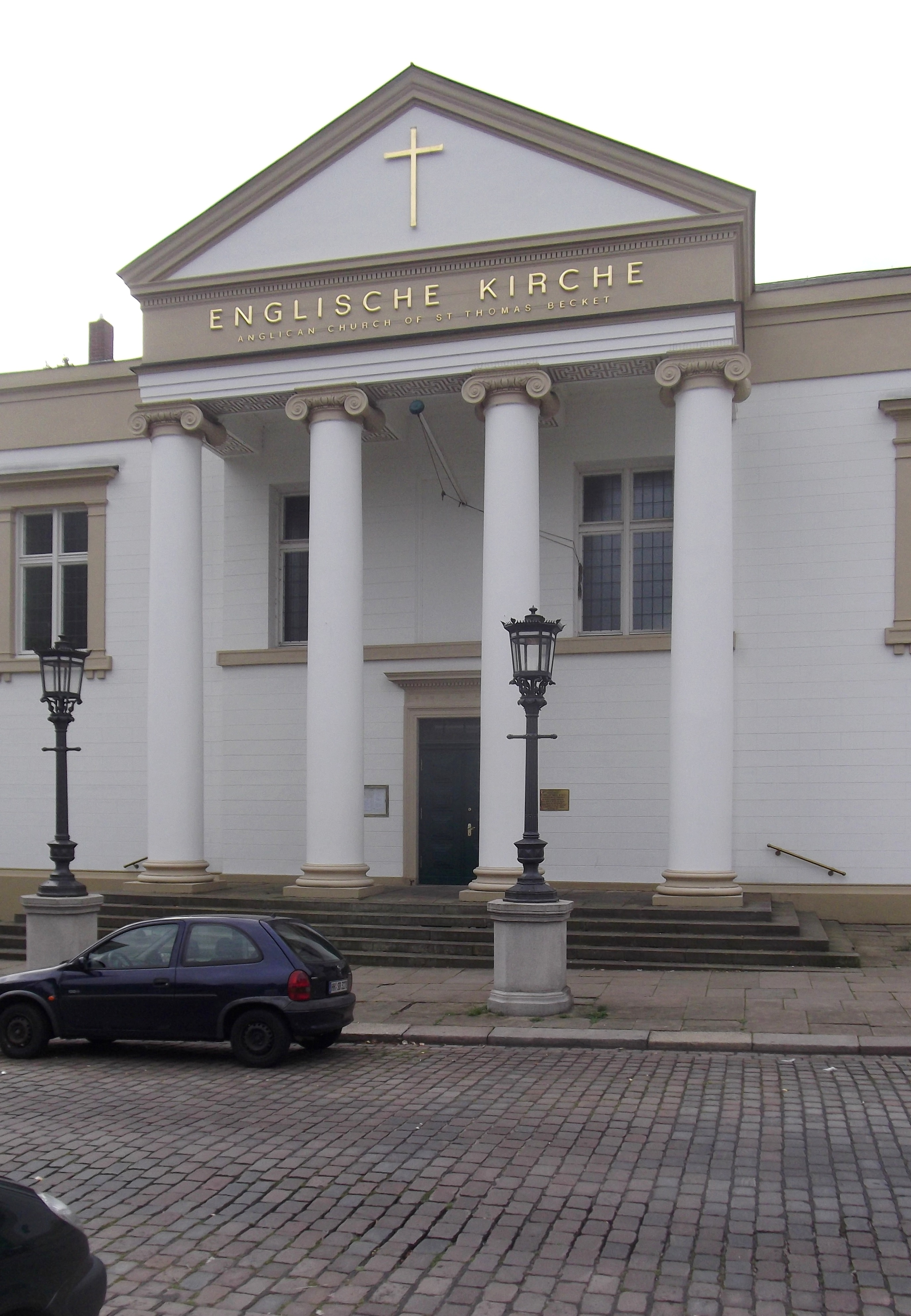 Hamburg, August 2015